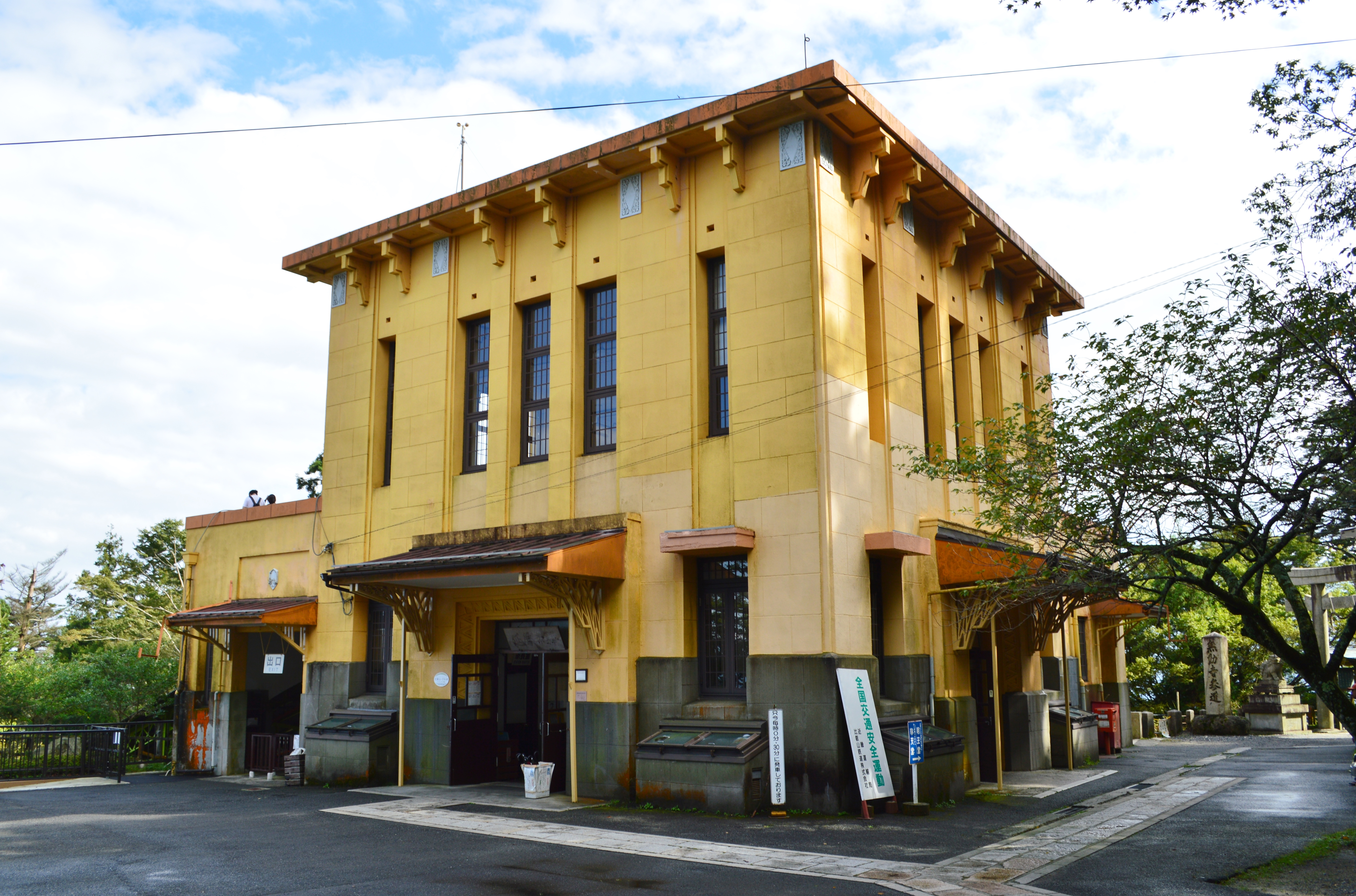 ケーブル延暦寺駅 駅舎